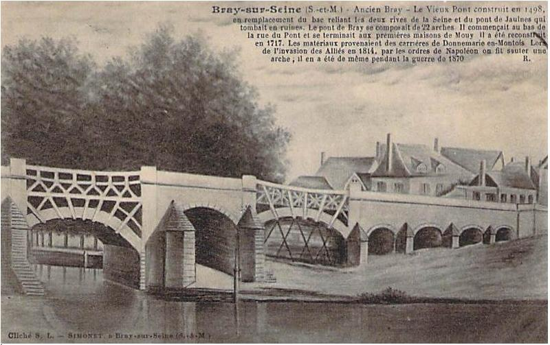 Bray-sur-seine-le-vieux-pont